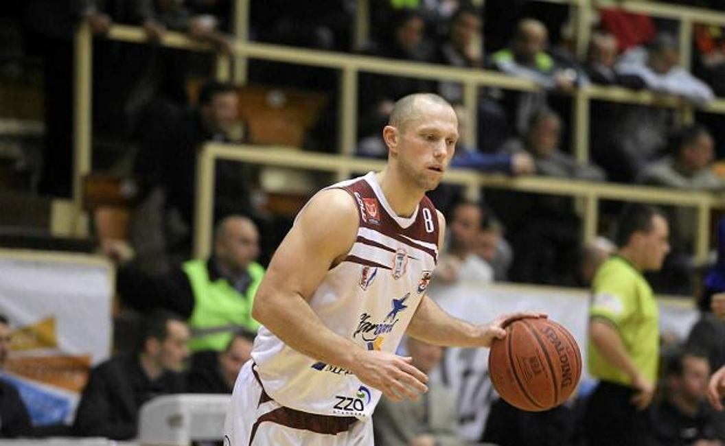 Stargard, 2013r. Adam Parzych w Spójni (2010-2013)